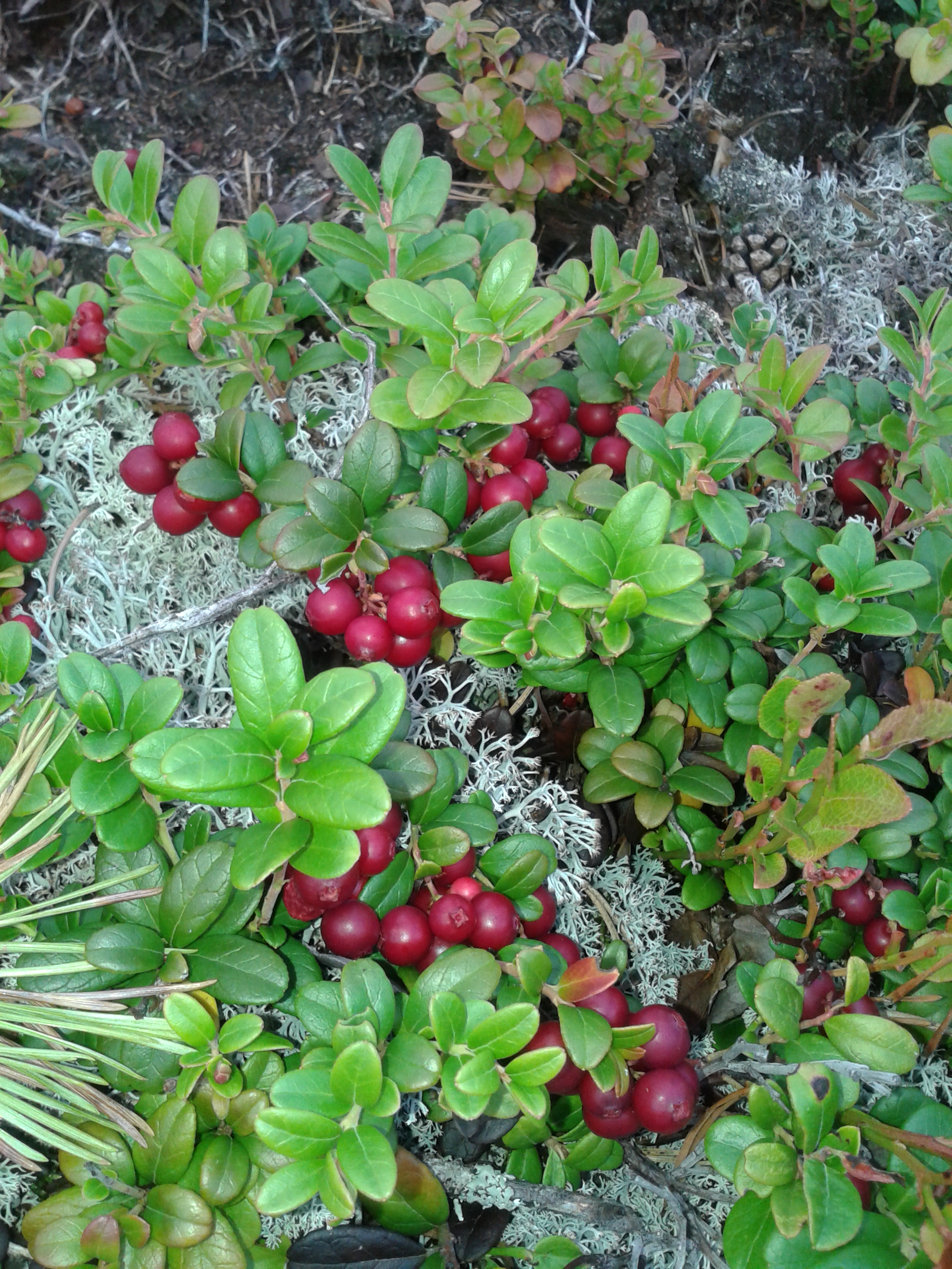 брусниця